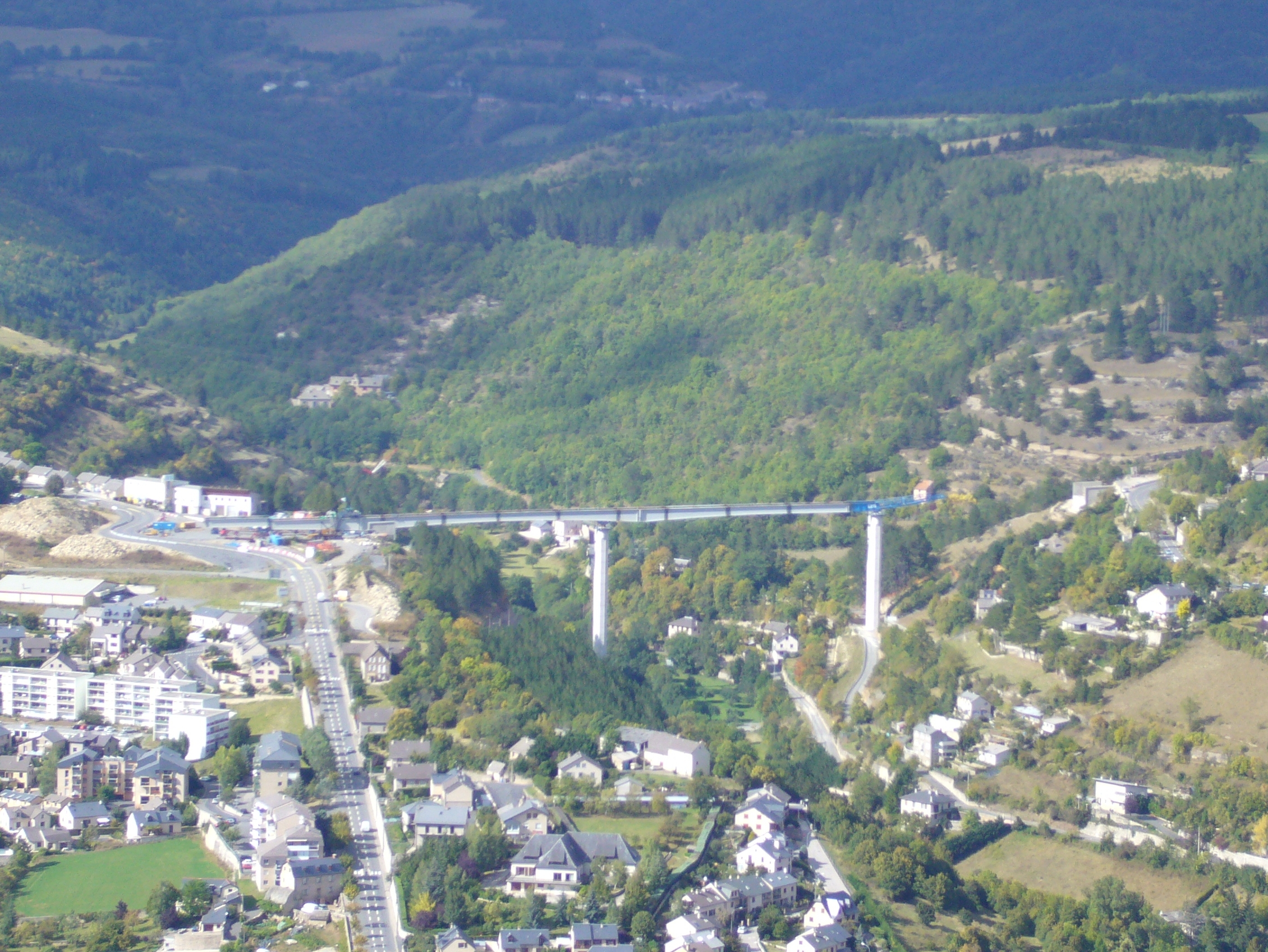 Le viaduc de Rieucros en construction, Mende (Lozère, France)